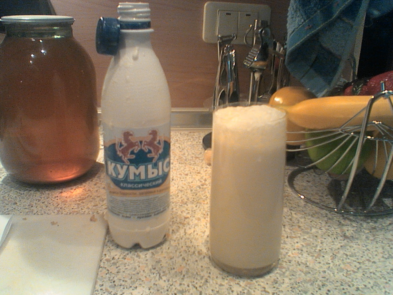 Glass & bottle of kumis.